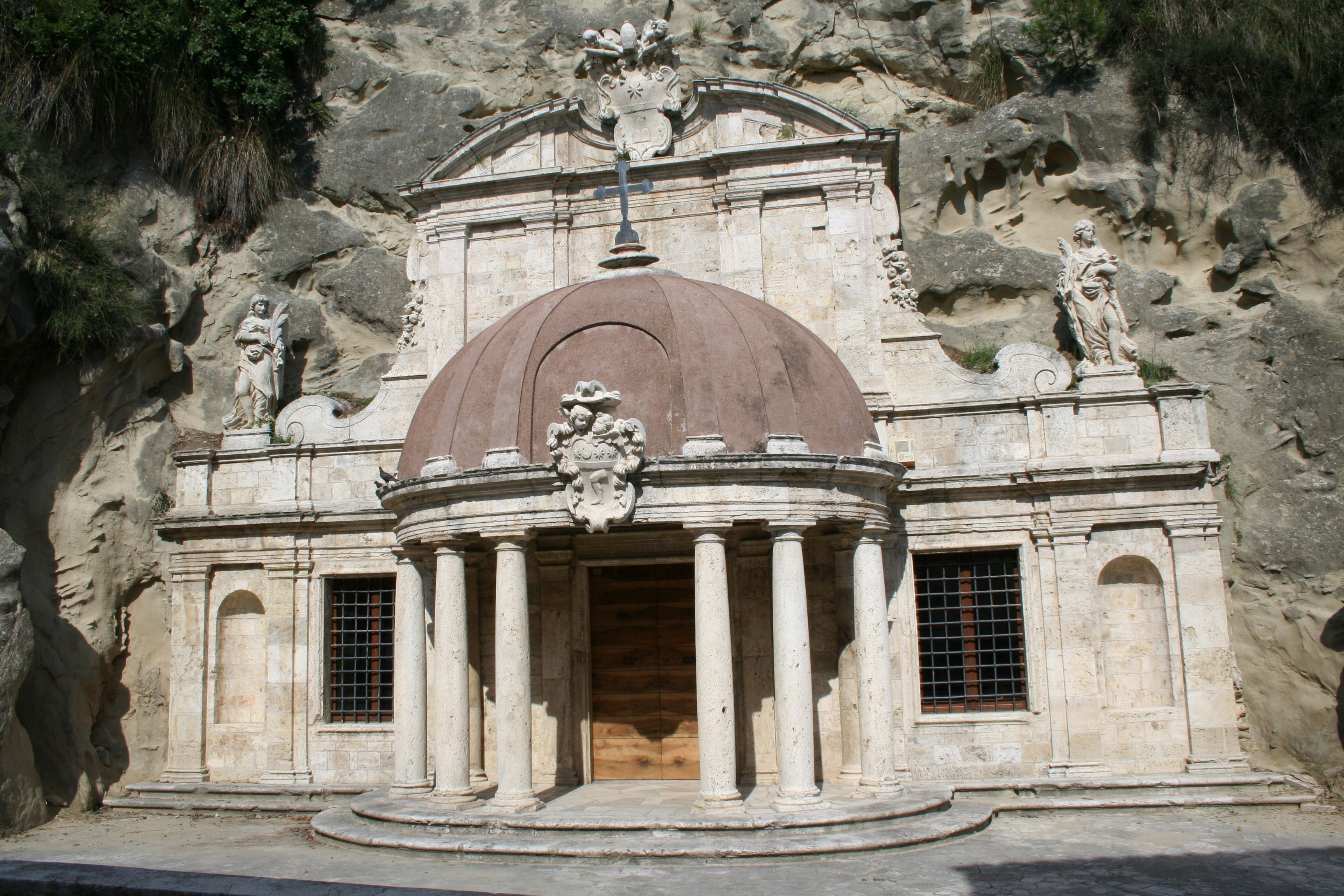 Description facciata di Sant'Emidio alle Grotte, ottobre 2006 Sourceproprio scatto Date2006-10-01 AuthorSibilla.io Permission"Utilizzo concesso" This file is licensed under Creative Commons Attribution 3.0 License